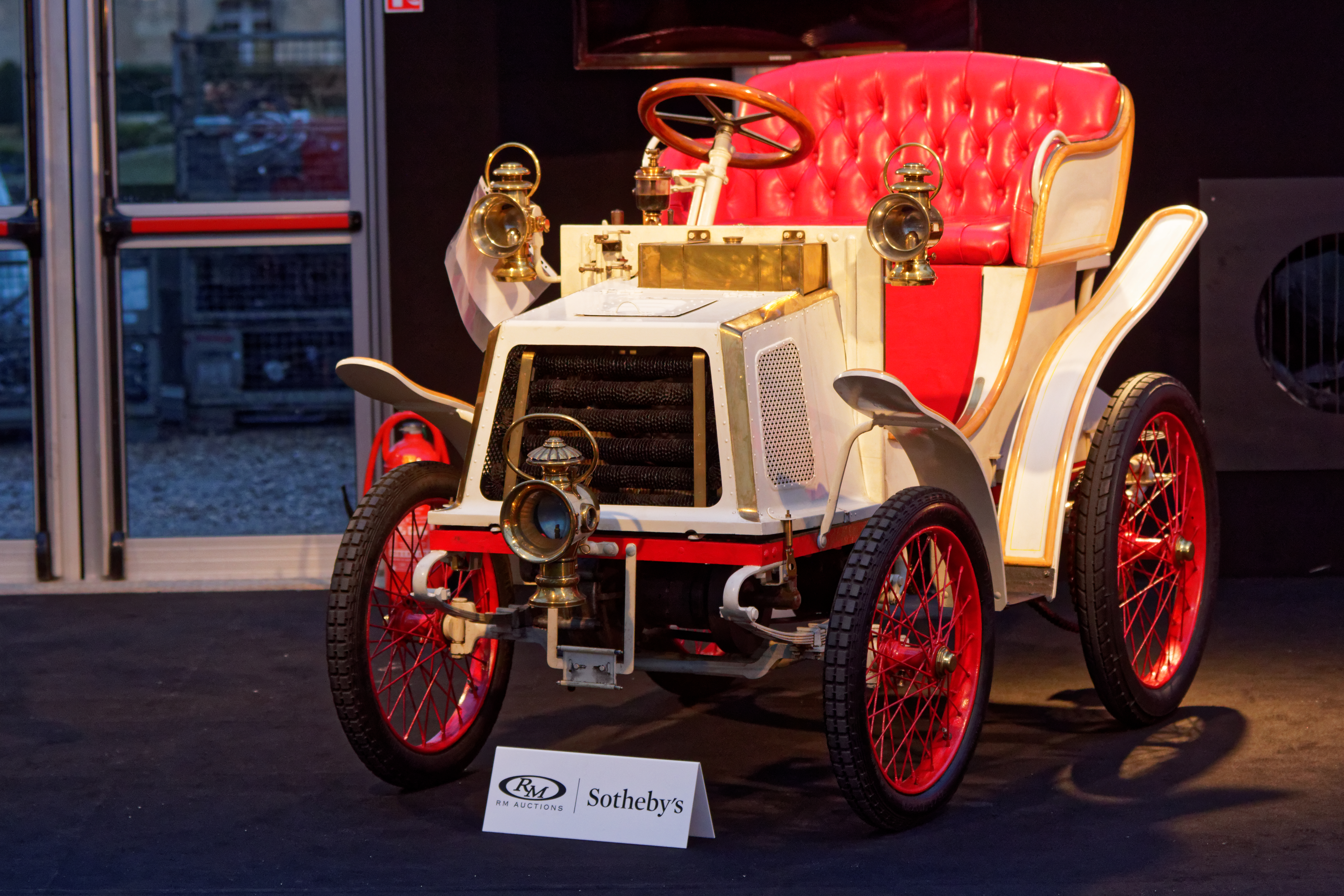 Une Créanche Type A Voiturette de 1900 exposée lors de la vente RM Sotheby’s 2016 aux Invalides à Paris.